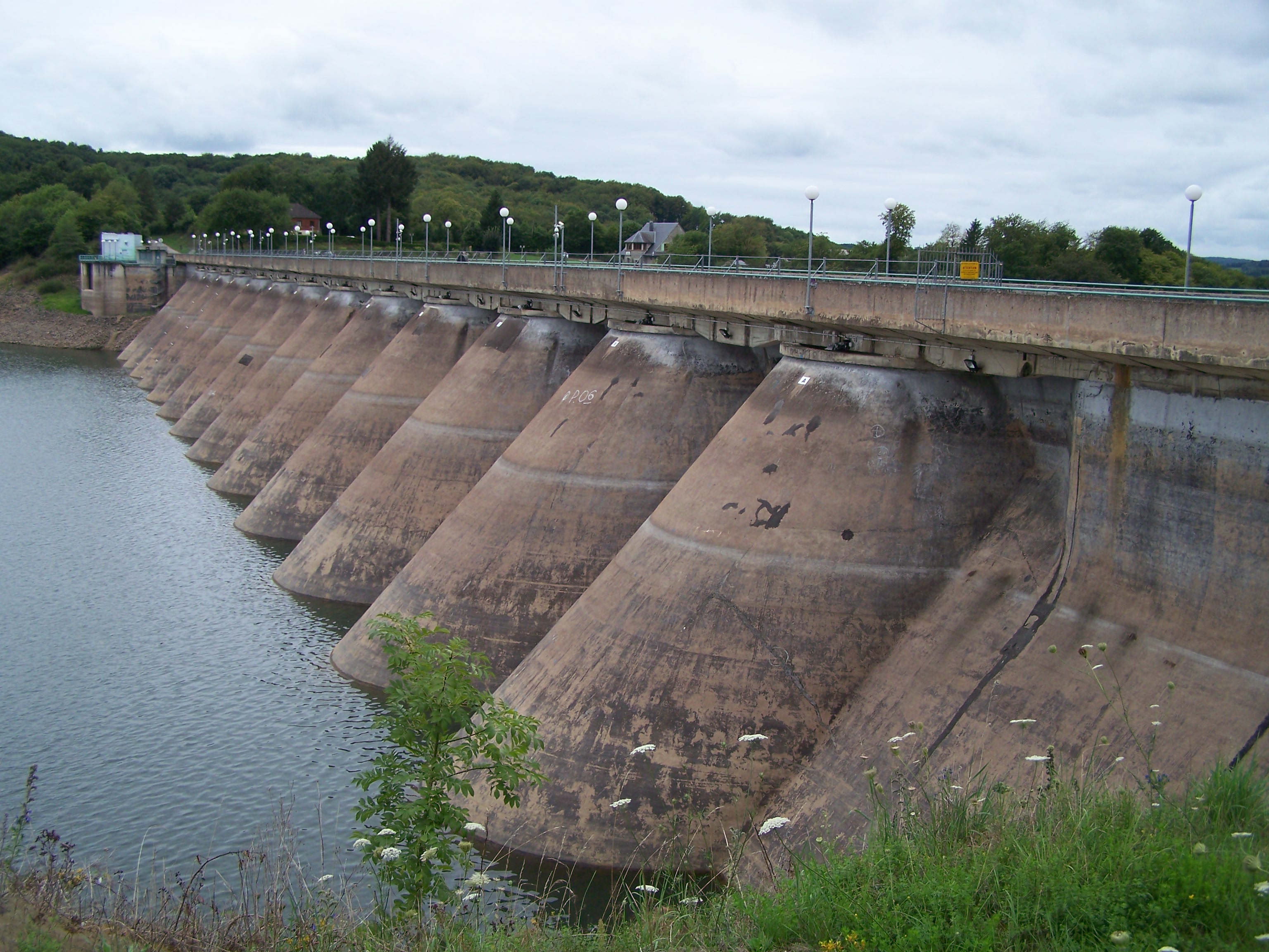 Vue en amont du barrage hydroélectrique du lac de Pannecière (Nièvre, France) en août 2011, lors d'une vidange partielle du lac.